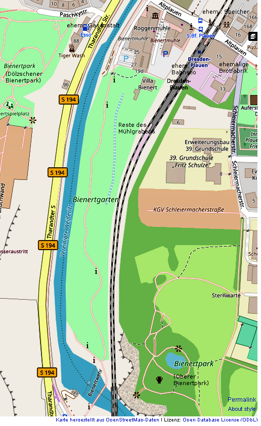 Die Bienertmühle in ihrer Umgebung